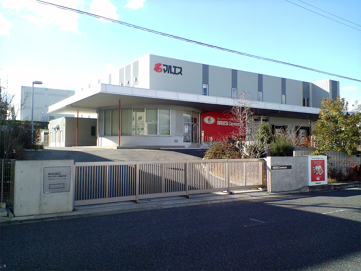 投稿者自身が『株式会社マルエス テクノステージ第2工場』 （大阪府和泉市テクノステージ1-4-1）を撮影。